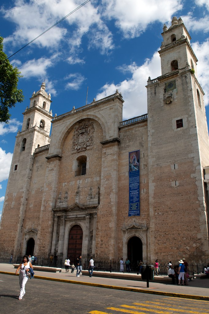 Catedral de San Ildefonso, Mérida, Yucatán, México